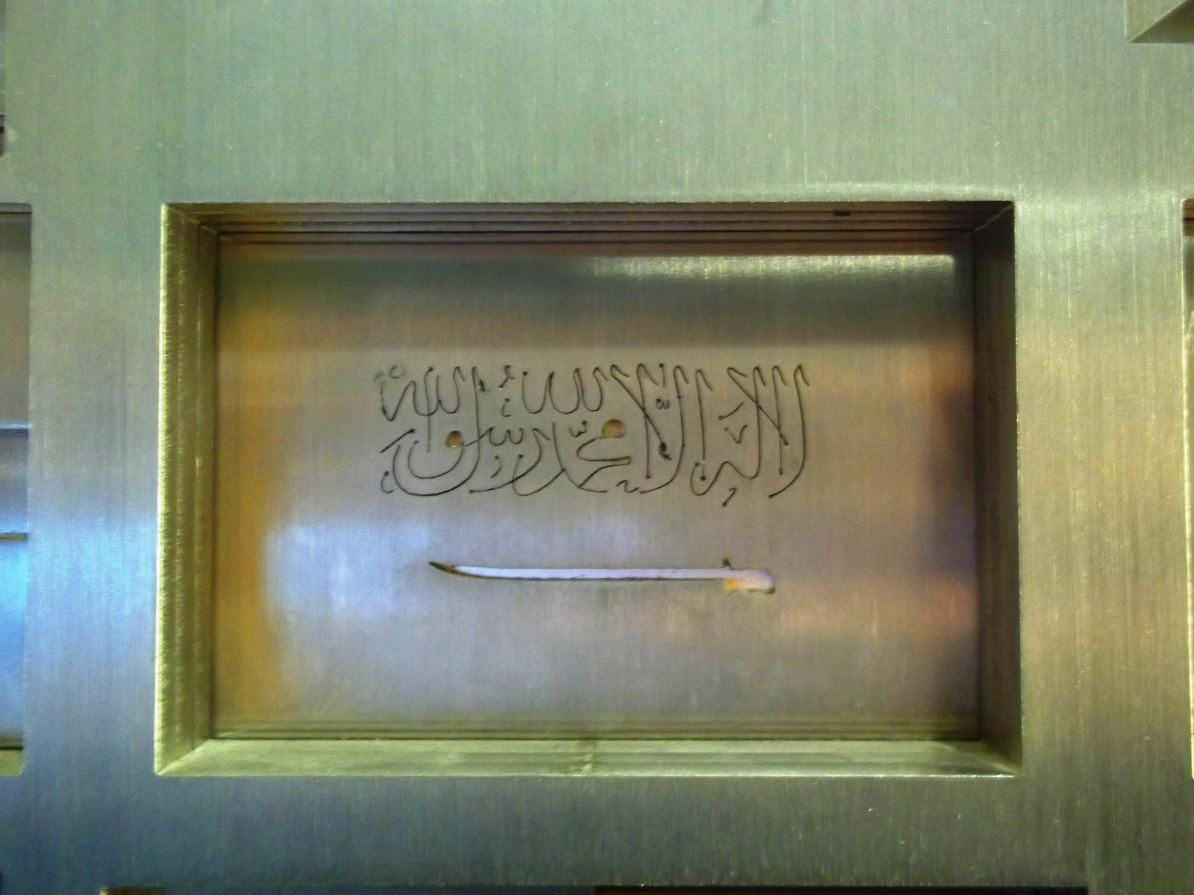 Sculpture de Michel Goulet intitulée Tables, de 2005. Elle est située dans le Montréal souterrain, dans le périmètre du Quartier international de Montréal, à l'entrée de la place Jean-Paul-Riopelle. « J'ai toujours privilégié dans mon travail l'usage d'objets issus du quotidien, des outils, du mobilier domestique mais aussi des signes qui, par convention sociale, sont des précis d'idées et de concepts. Je tiens pour acquis qu'une chaise ou la lettre « A », tout en étant réels, n'ont plus temporairement d'efficacité ou de valeur en soi, mais en tant que signes de quelque chose d'autre. La fonction symbolique de l'art est mieux servie par des associations d'images (ou d'objets) qui animent l'esprit que par celles qui illustrent ou racontent. »